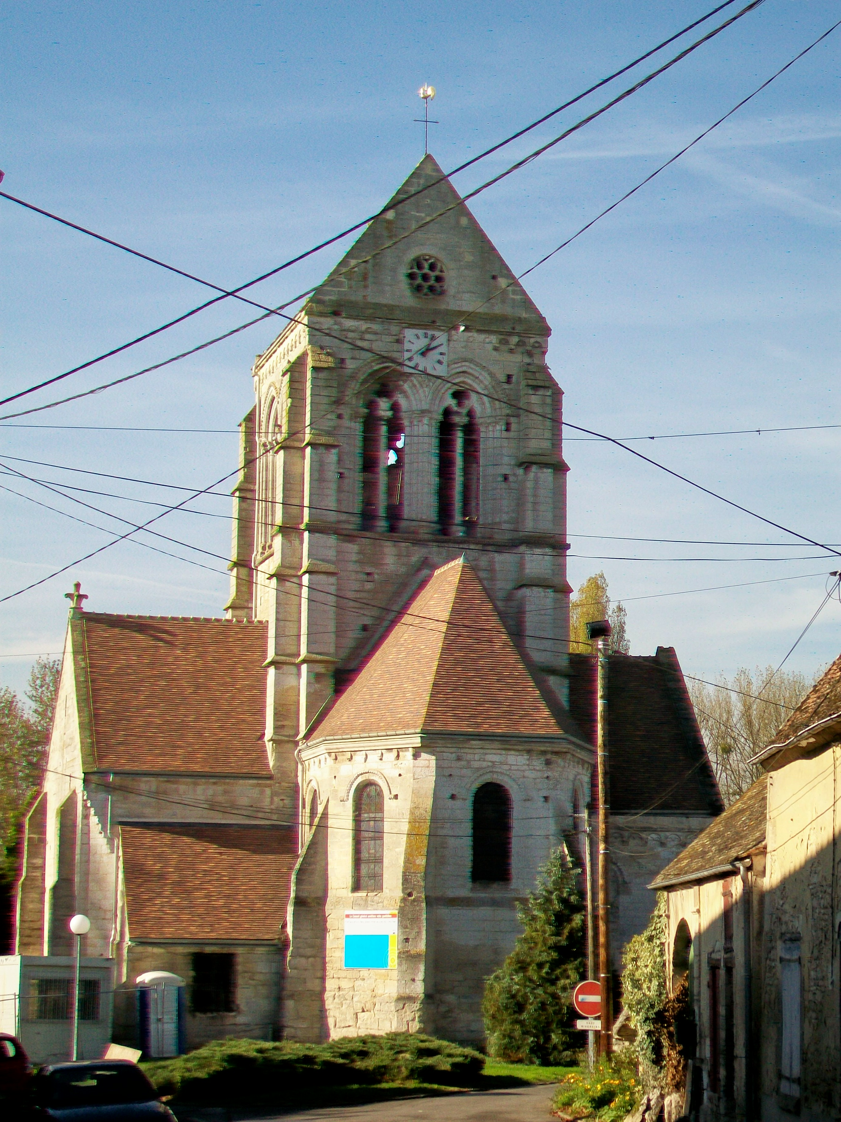 La façade orientale en venant du centre-ville. Un enfouissement des réseaux électriques et téléphonique s'imposerait ici pour des raisons esthétiques.